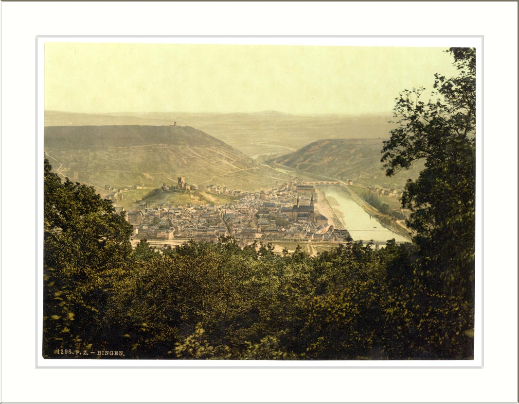 From Niederwald Bingen the Rhine Germany